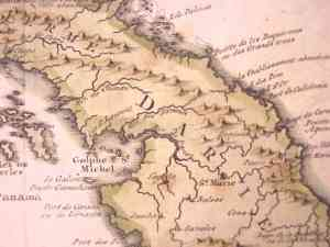 Karte von Darien 17.Jh Sonstiges: keine Varianten, Urheberrecht verfallen